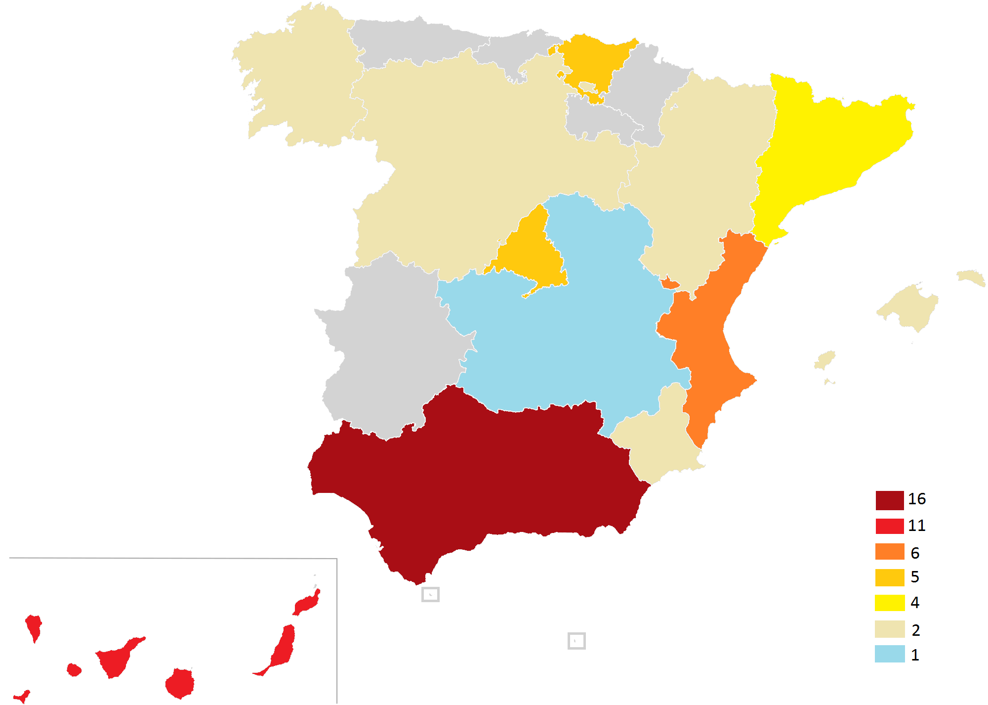 Miss España por comunidad autonoma (2012)